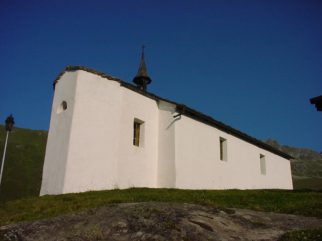 Kapelle auf der Alpe Bel